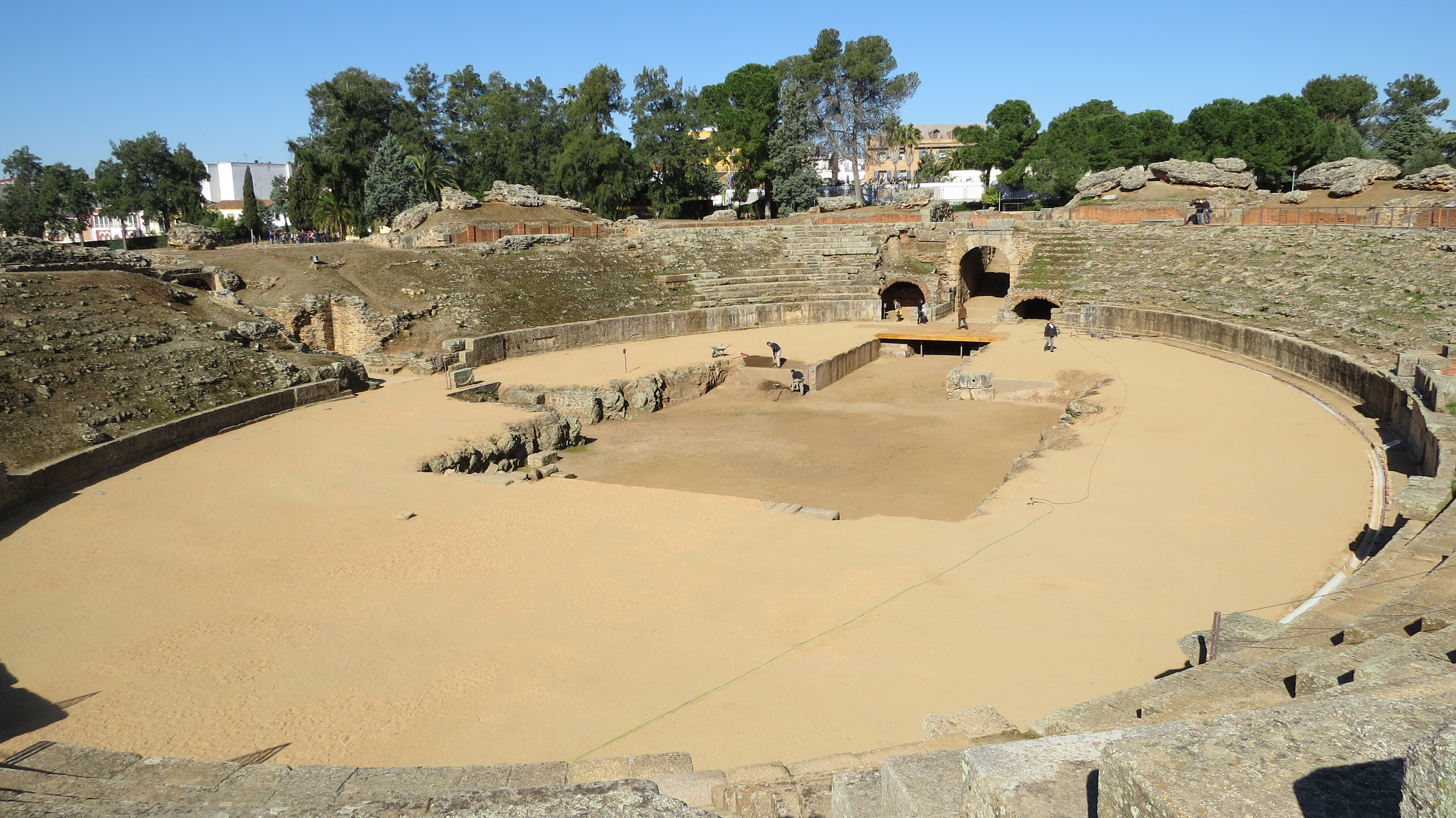 Rimski amfiteater v Meridi, Extremadura, Španija.